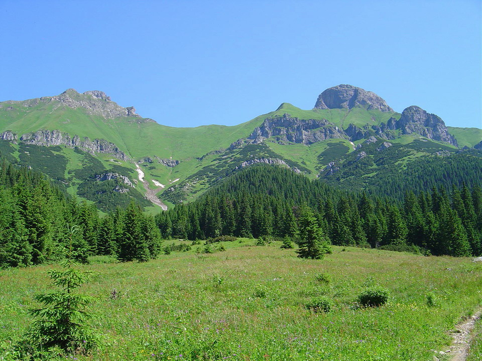 Havran (left) and Zdiarska vidla (right) from Zadne Medodoly